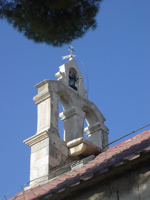 Crkva sv. Martina u Vranjicu